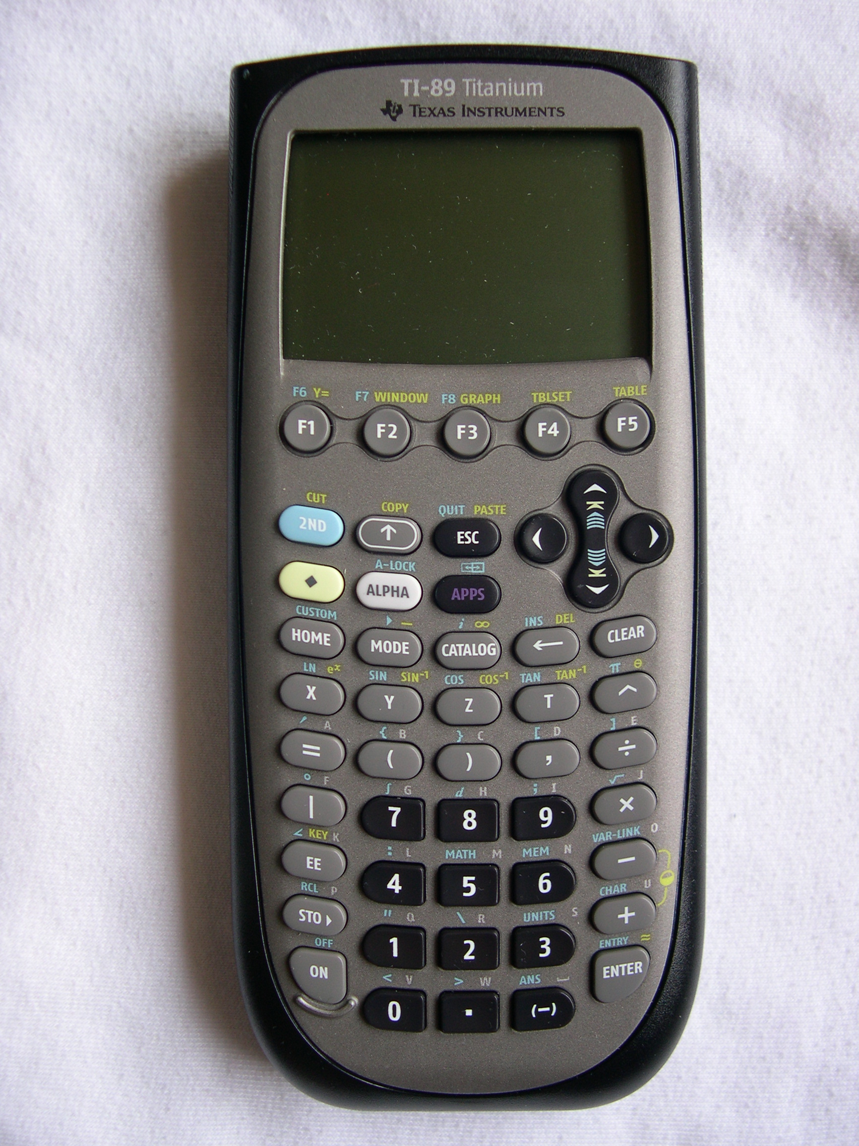 picture by Frédéric Bonifas